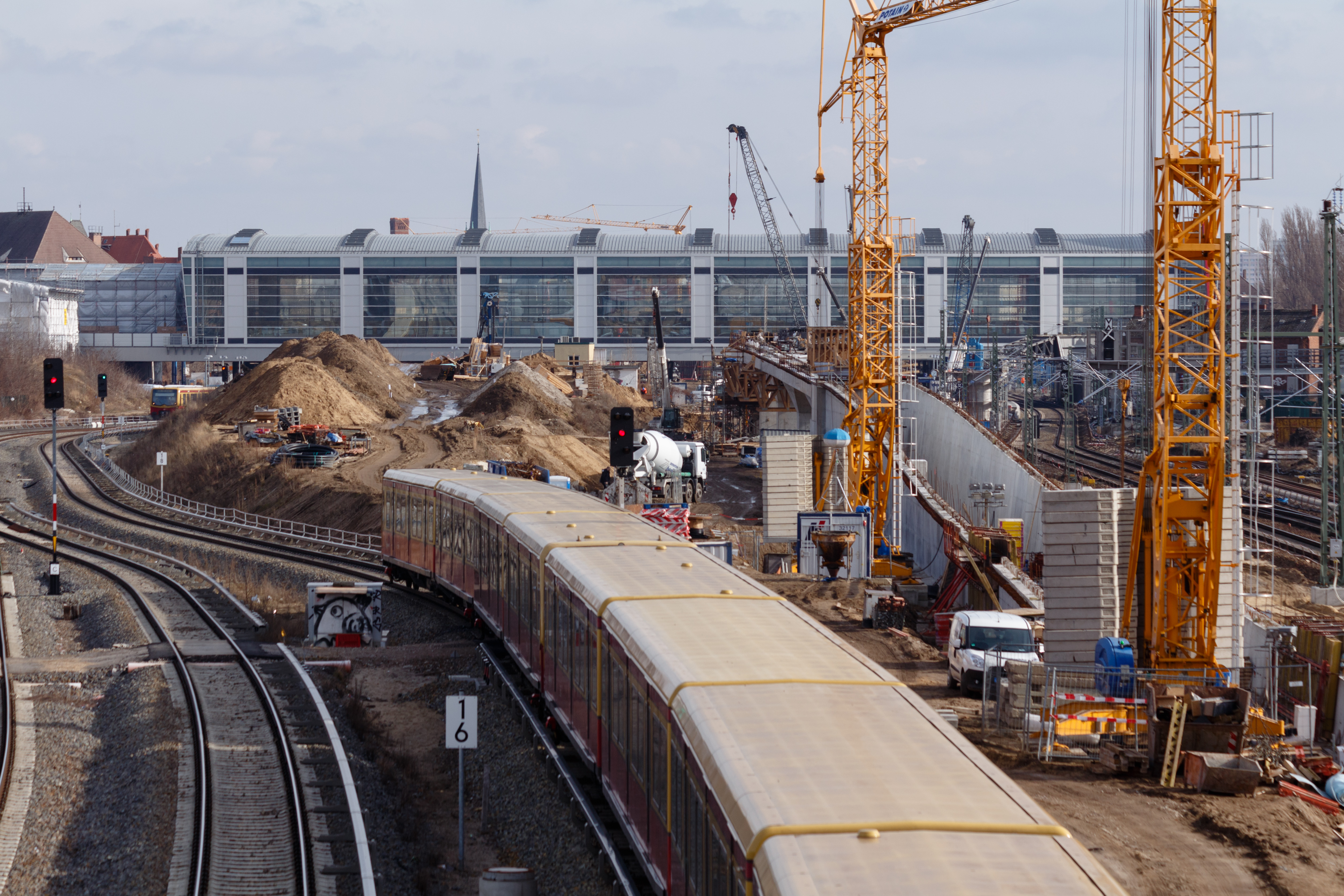 Baustelle Ostkreuz